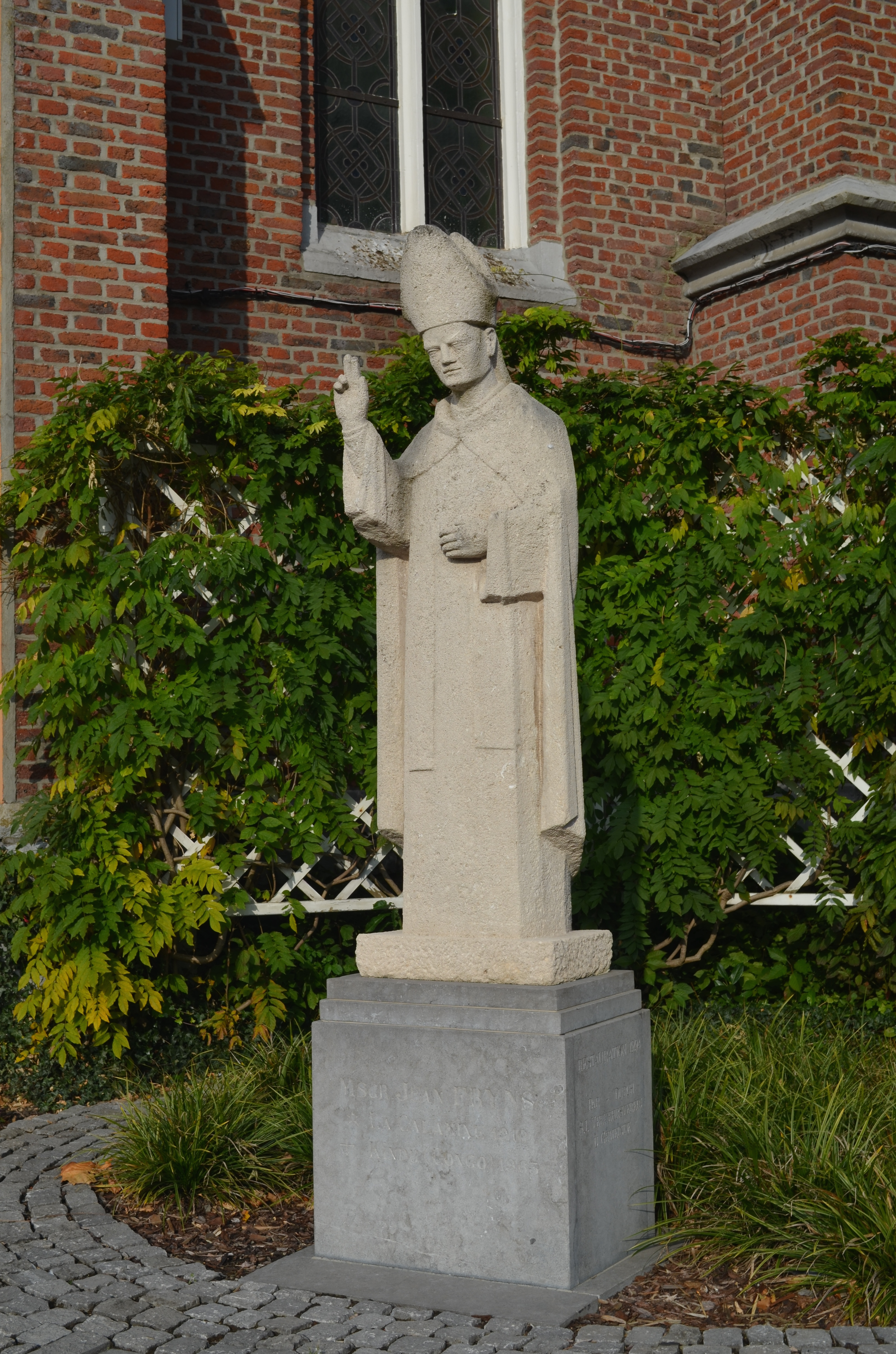 La Calamine (Belgique) - monument commémoratif pour Jean Fryns, né à cet endroit le 5 juillet 1910, premier évêque du diocèse de Kindu le 12 avril 1957. Il y meurt le 2 juillet 1965.